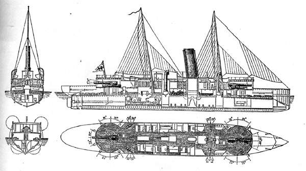 Чертеж крейсера типа "Чаоюн"